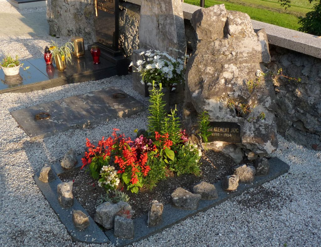 Grob Klementa Juga na Dovjem